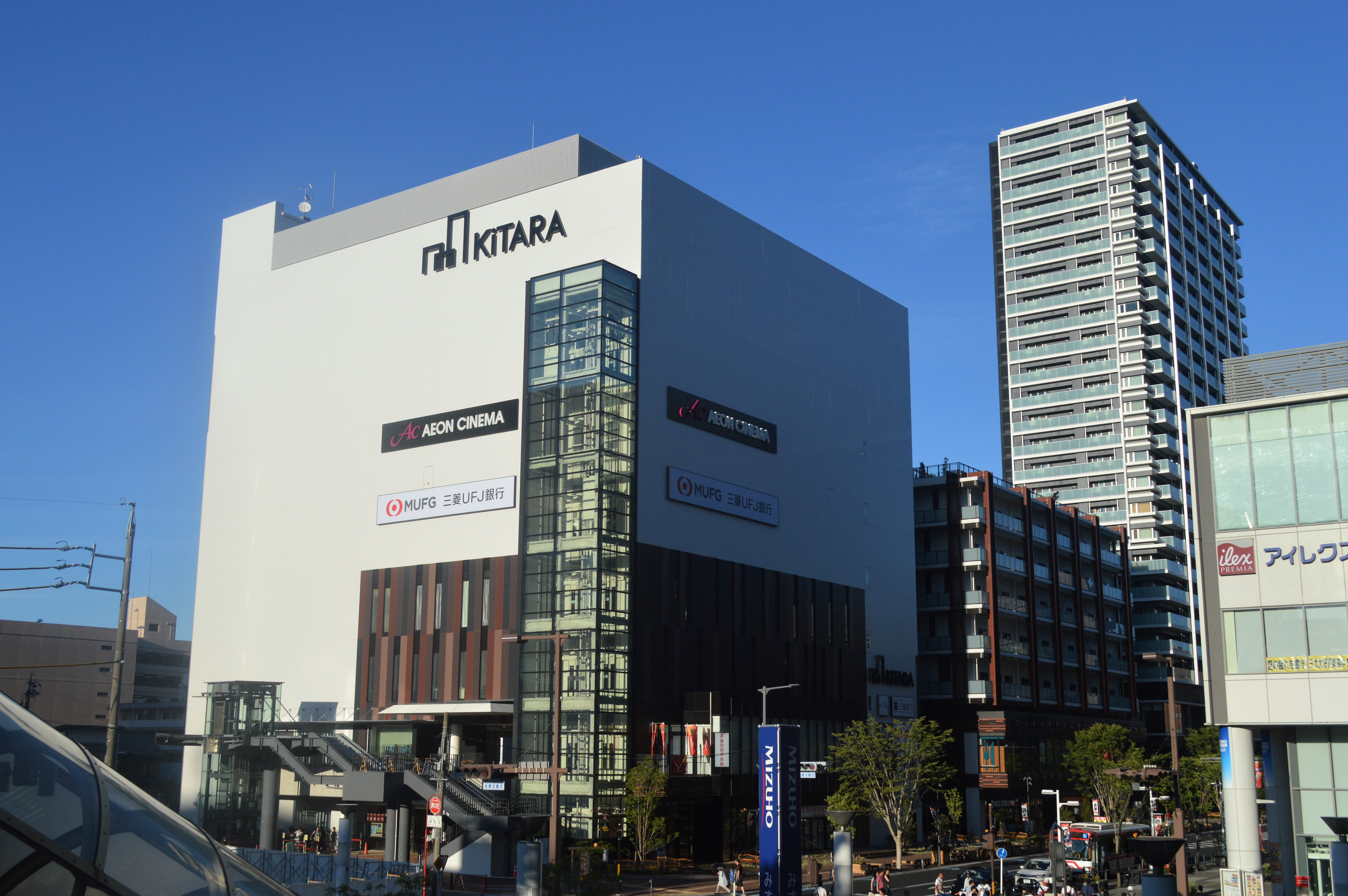 愛知県豊田市の豊田KiTARA。